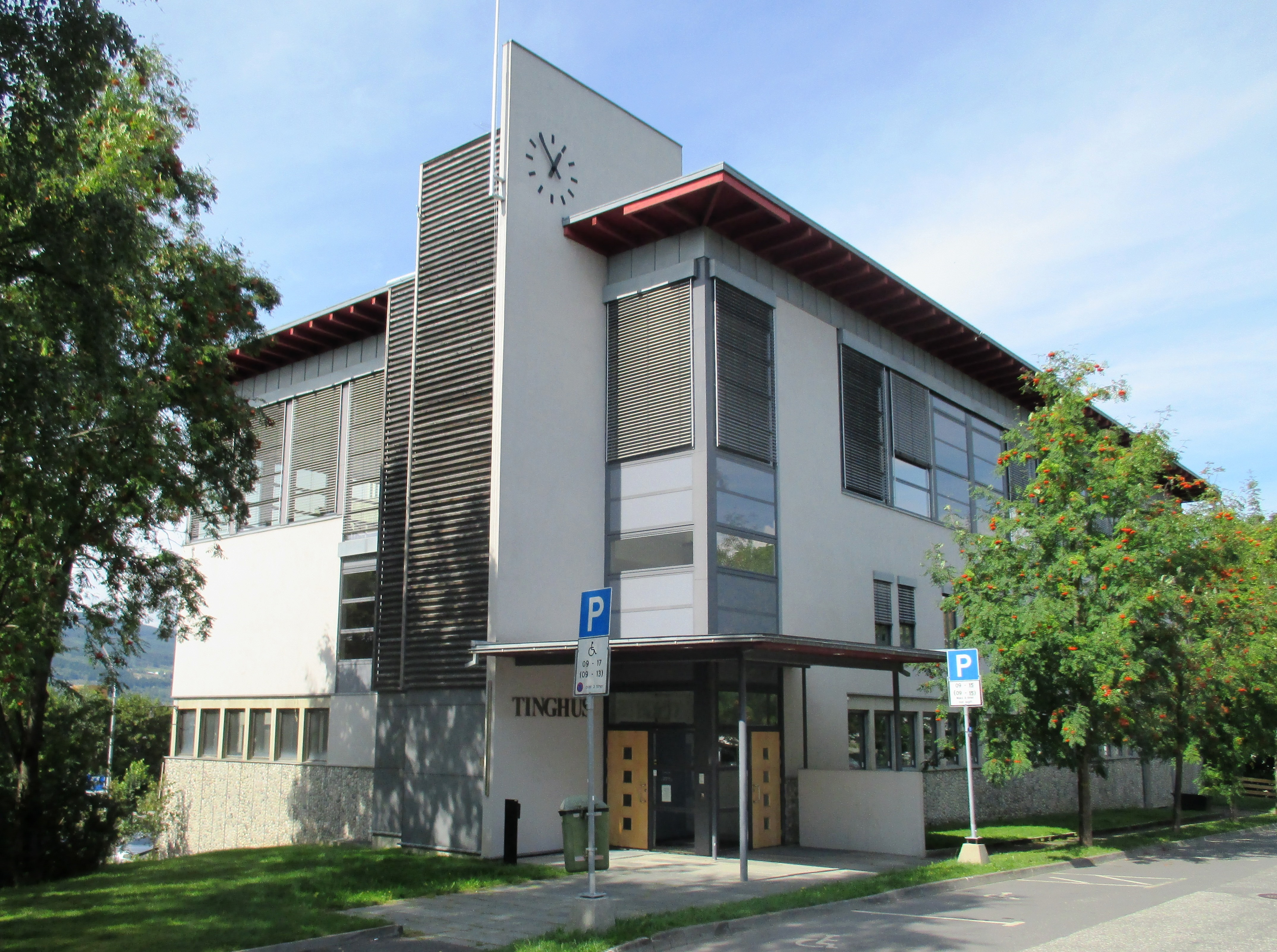 Sør-Gudbrandsdal tingrett holder til i tinghuset på Lillehammer